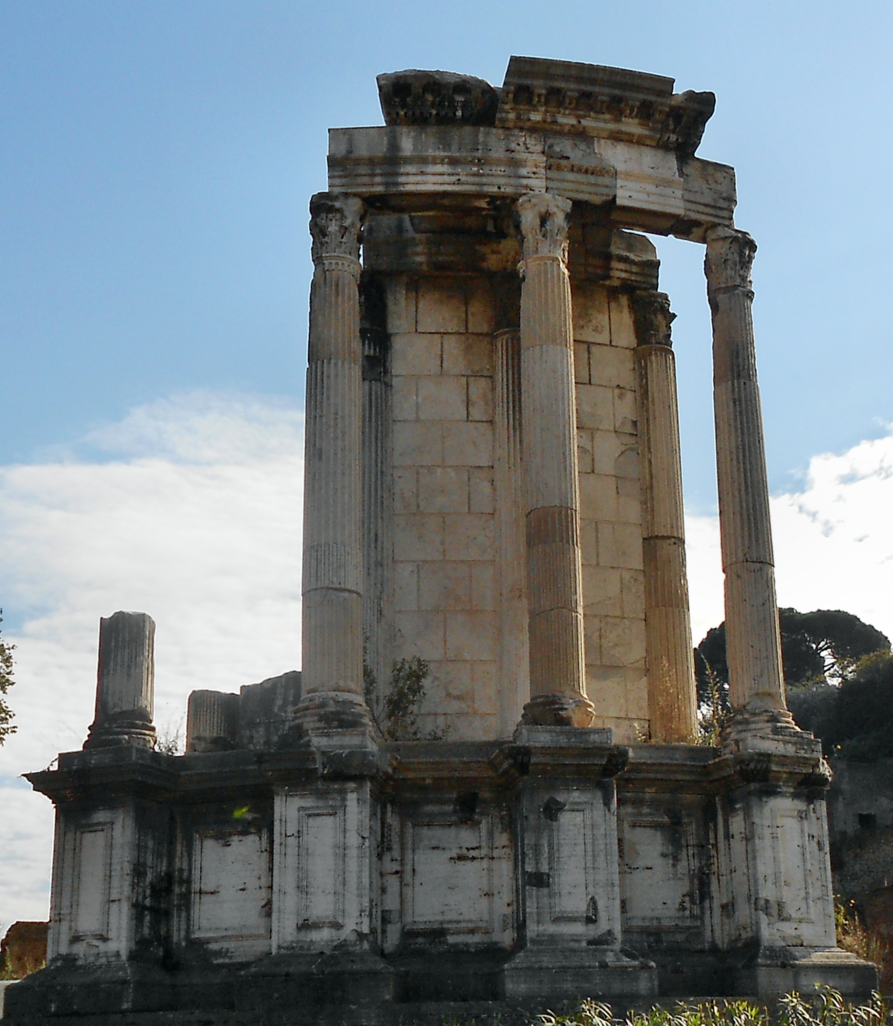 Frontansicht auf die Reste des Tempels der Vesta innerhalb des Forum Romanum.